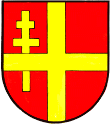 Wappen der Gemeinde Sankt Bartholomä (Steiermark) in Österreich